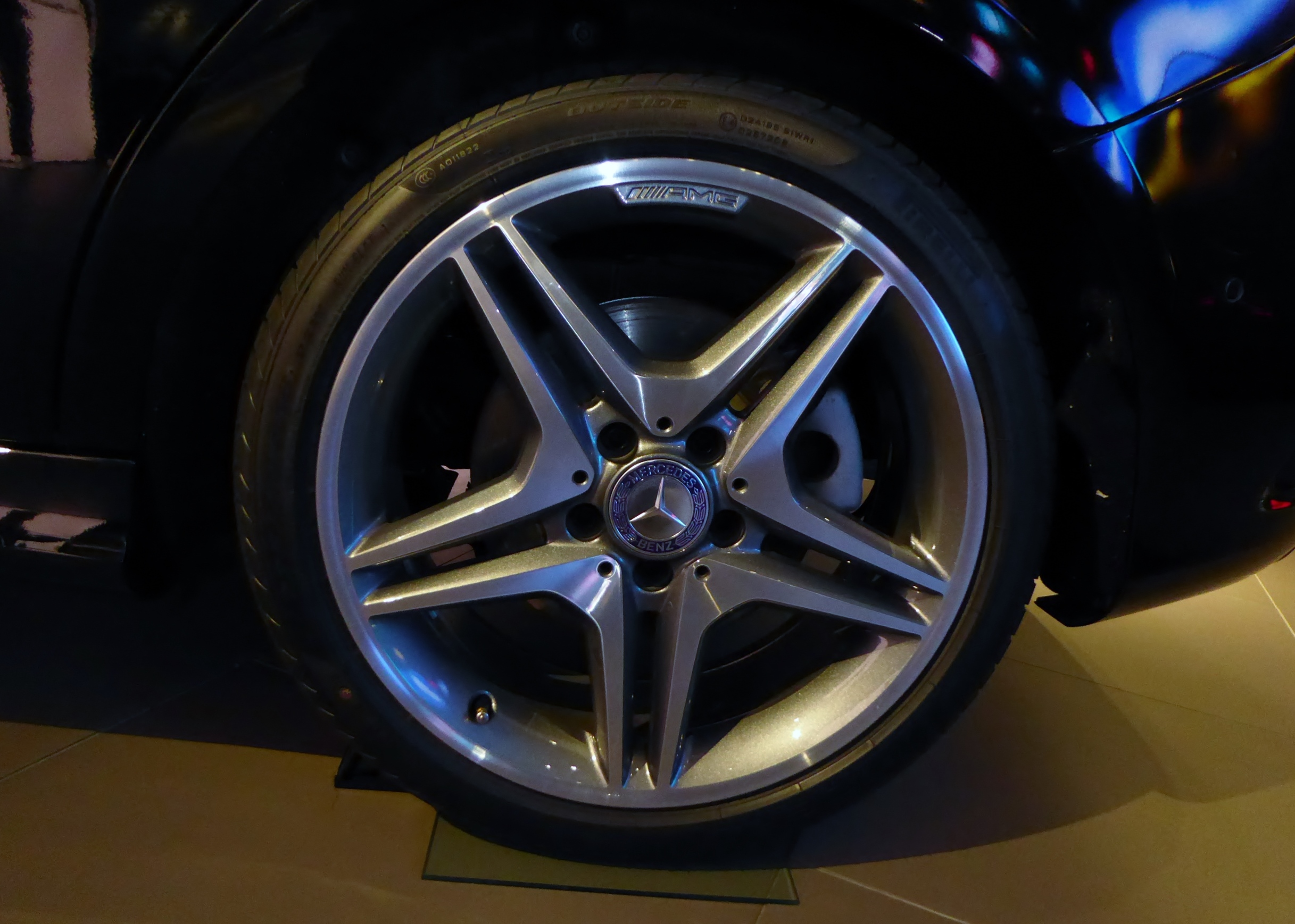 W246型メルセデス・ベンツB250 4マティックスポーツのホイールを撮影。